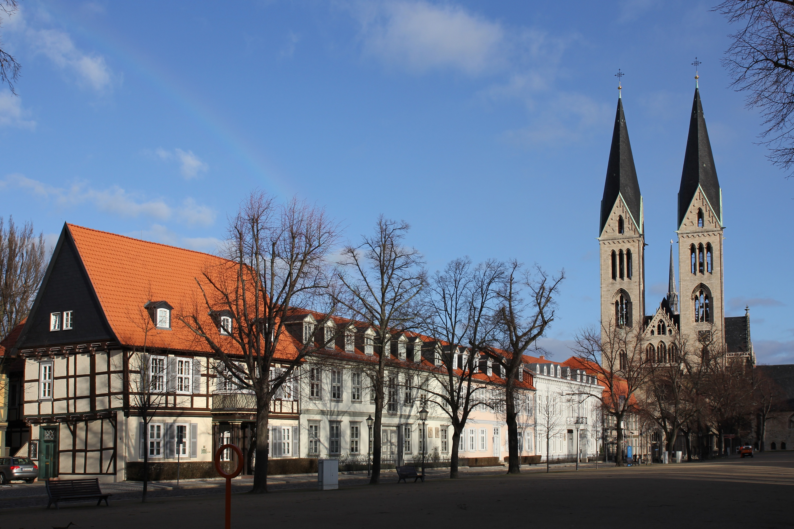 Ansicht des Domplatzes in Halberstadt, Kreisstadt des Landkreises Harz.